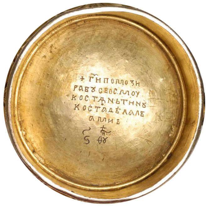 Изображение надписи на днище кратира Косты (Константина) из Софийского собора в Новгороде. Первая четверть XII в. Размеры: 21.5×20.5 см Нахождение: Новгородский государственный историко-архитектурный и худо­жест­вен­ный музей-заповедник, Инв. № 813.